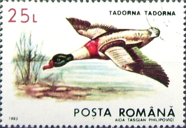 Source: Post of Romania